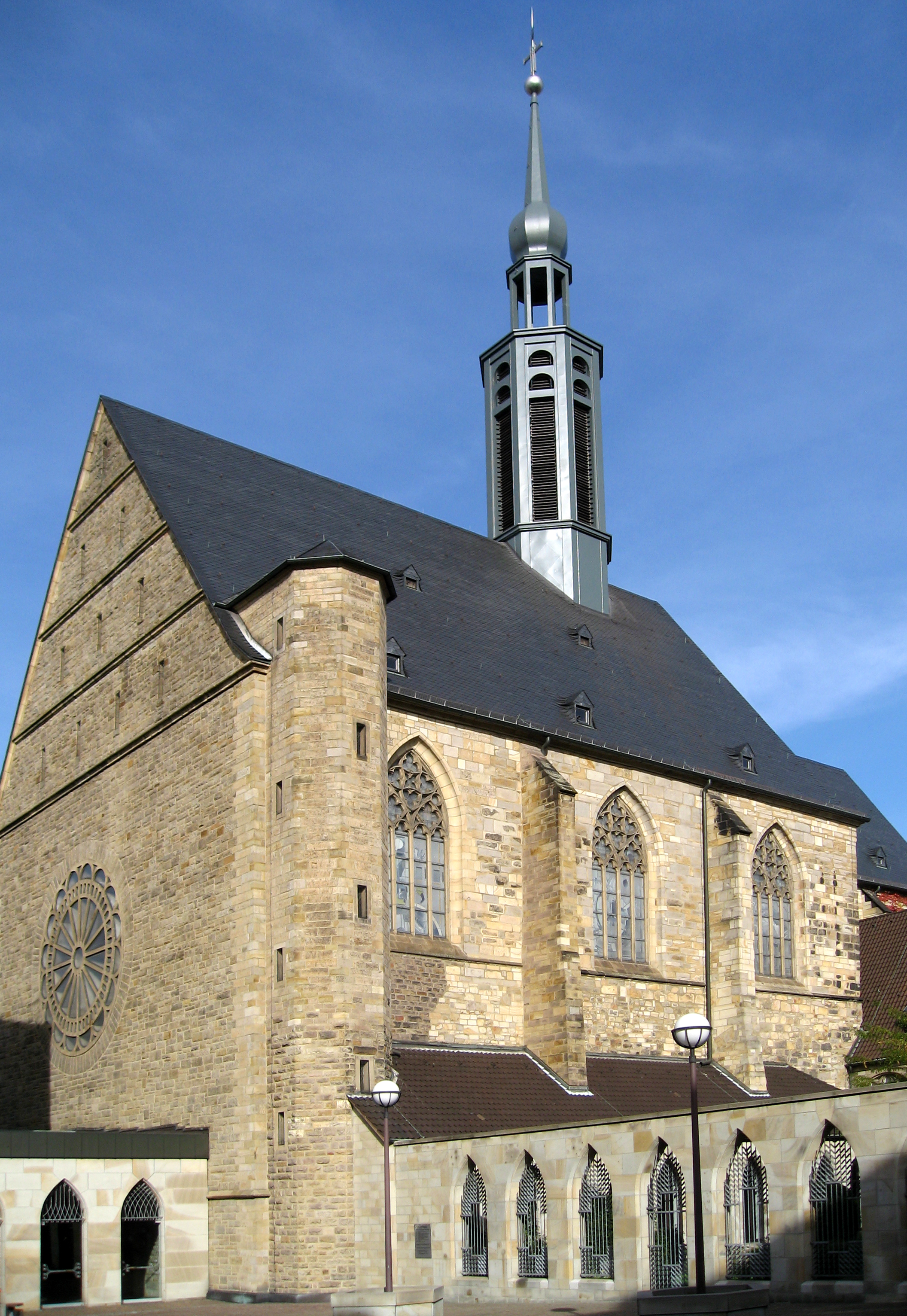 Propsteikirche Dortmund Südwestseite mit neuem Kreuzgang